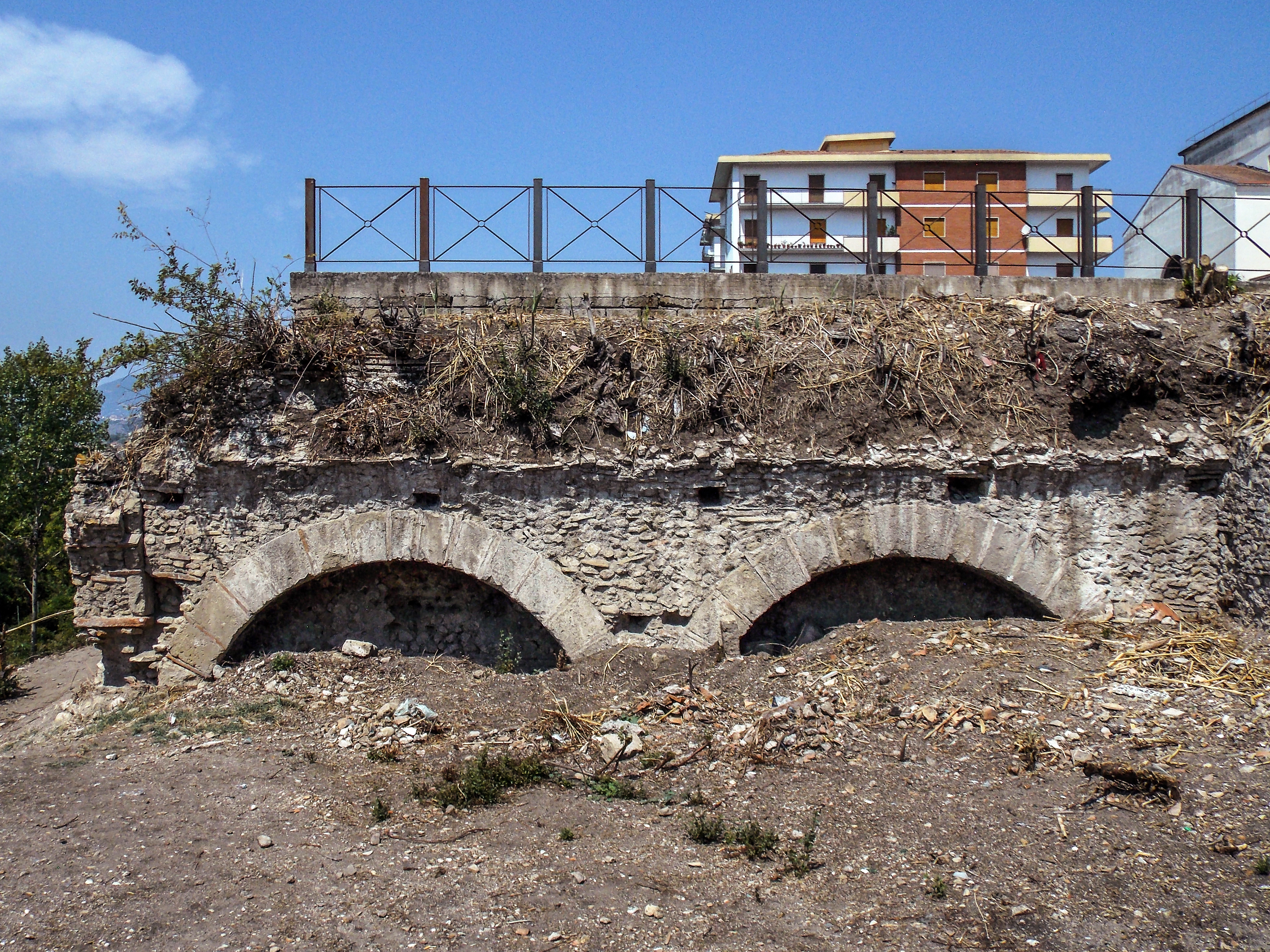 Criptoportico dei Santi Quaranta a Benevento. I resti interrati del corridoio est